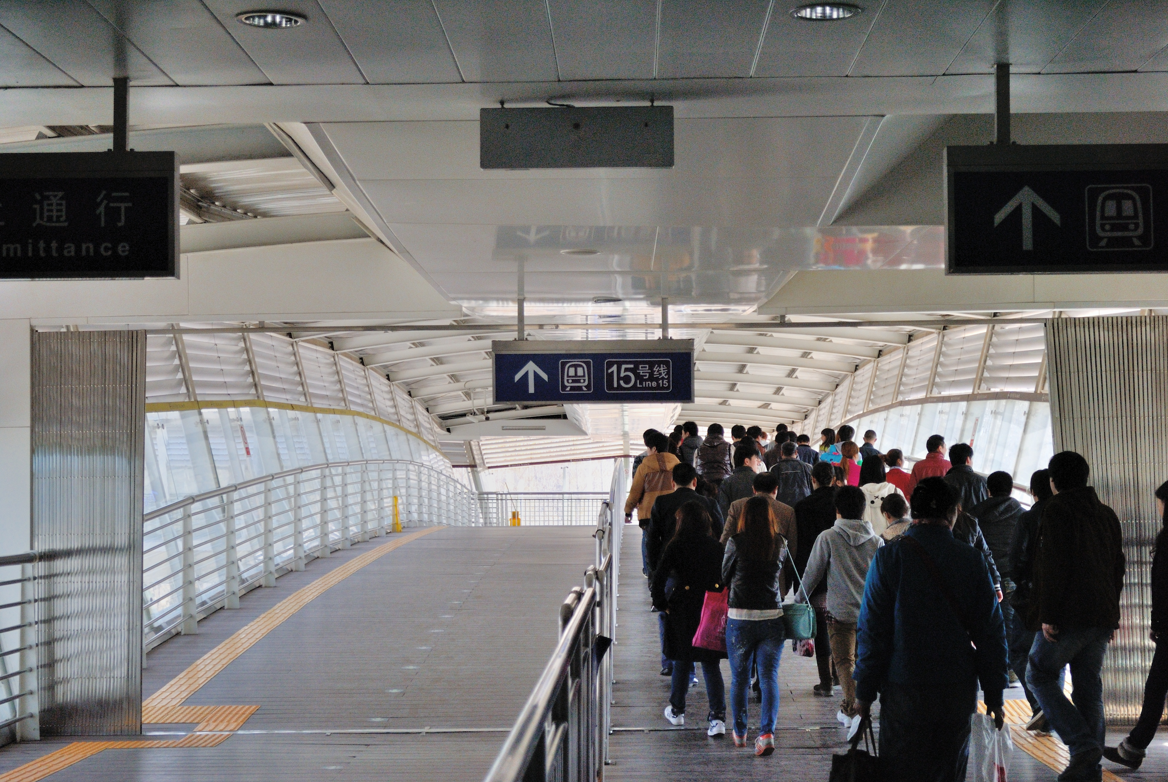 北京地铁望京西站换乘通道